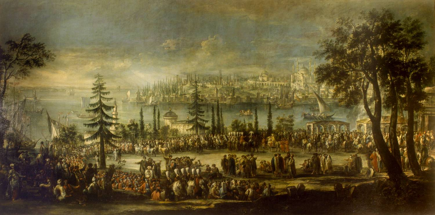 Der Einzug des "bailo" Alvise II. Mocenigo in Konstantinopel 1710